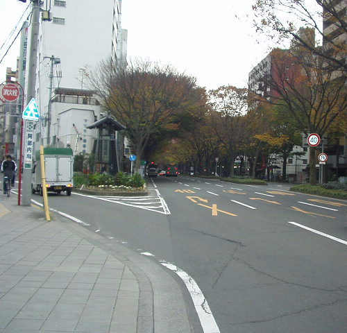 Aoba Avenue (Aoba Dōri). Sendai, Miyagi prefecture, Japan.